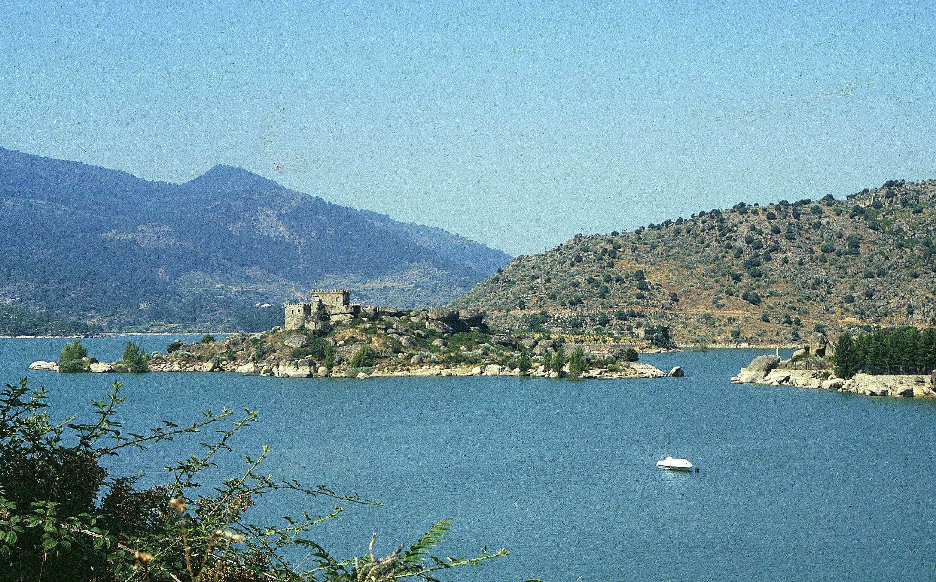 de-Burguillo-Stausee